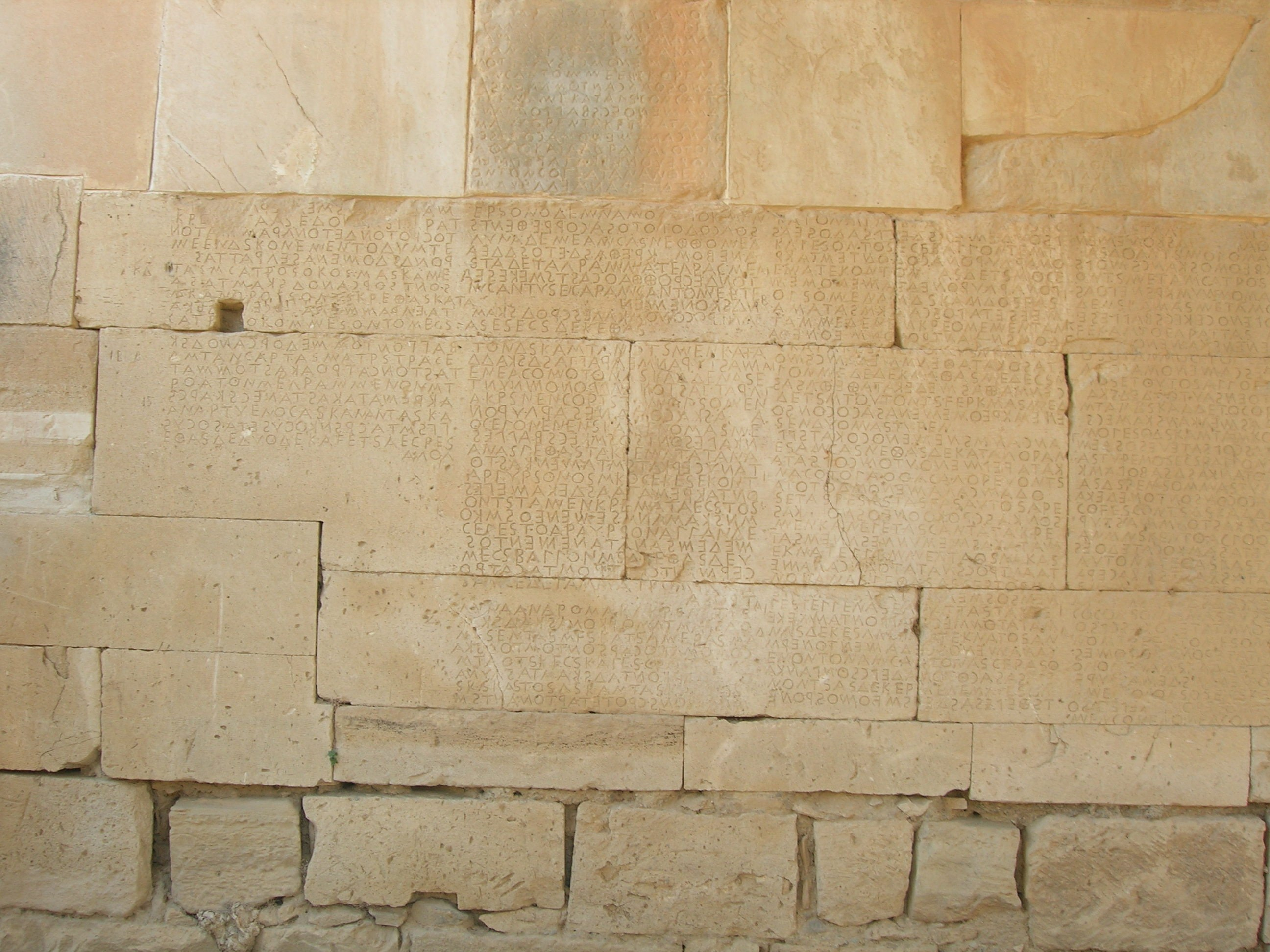 Gortyn, Greece. Gortyna, Grecja.